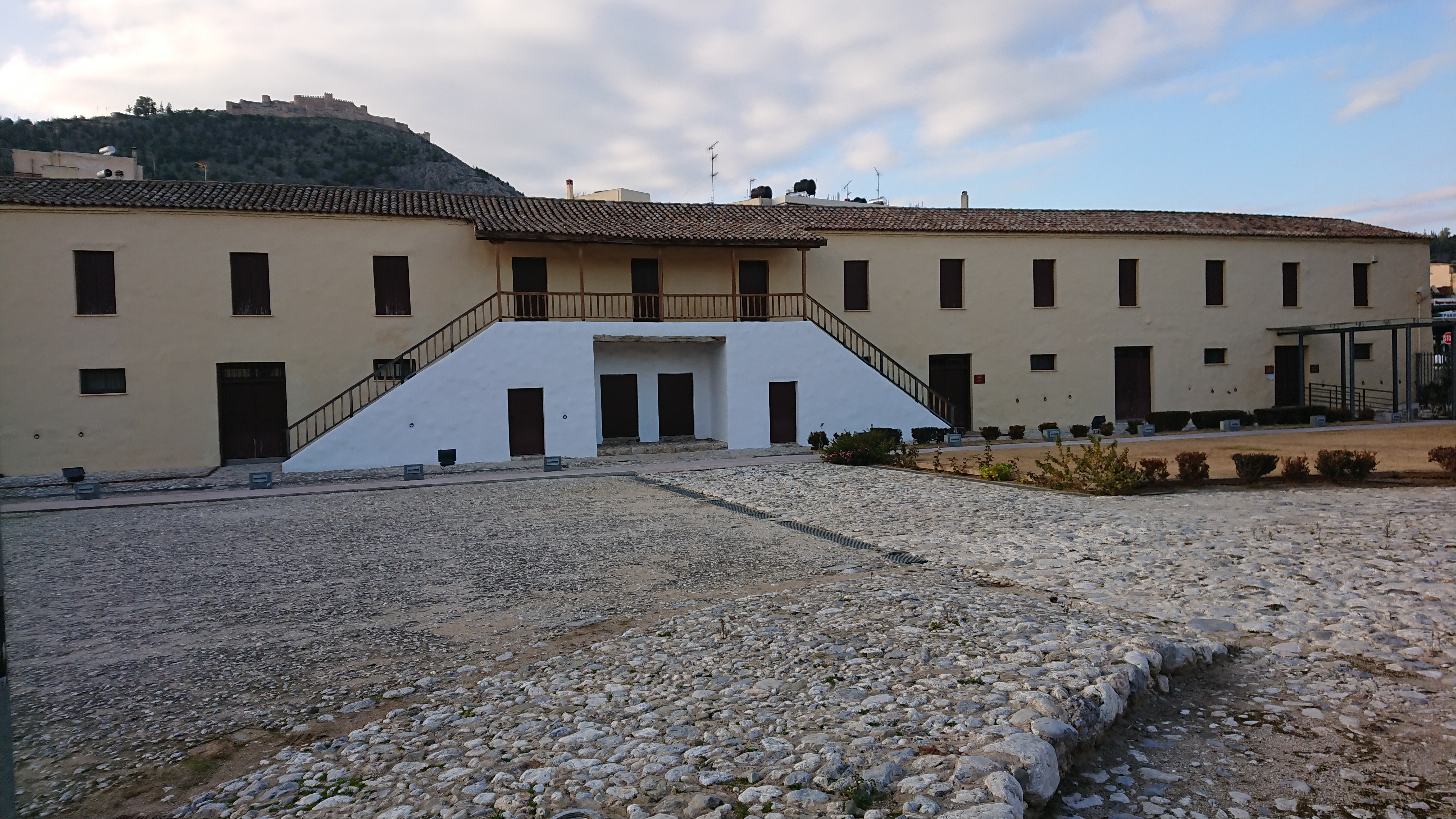 Μια πλευρά των Στρατώνων Καποδίστρια στο Άργος.